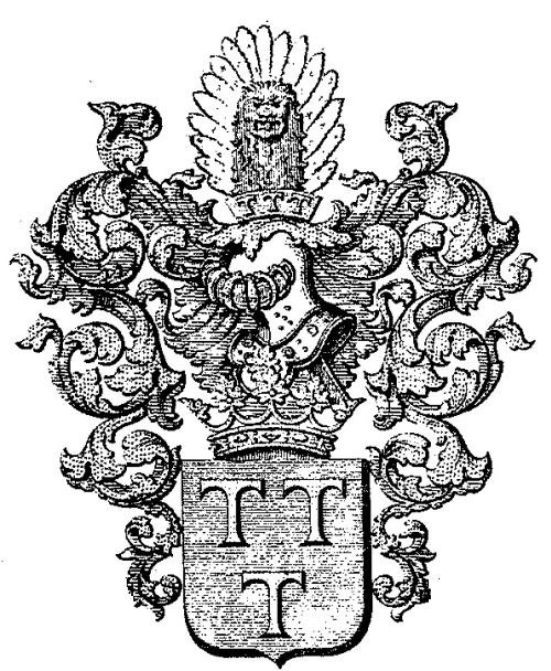 Praenobilis Familia